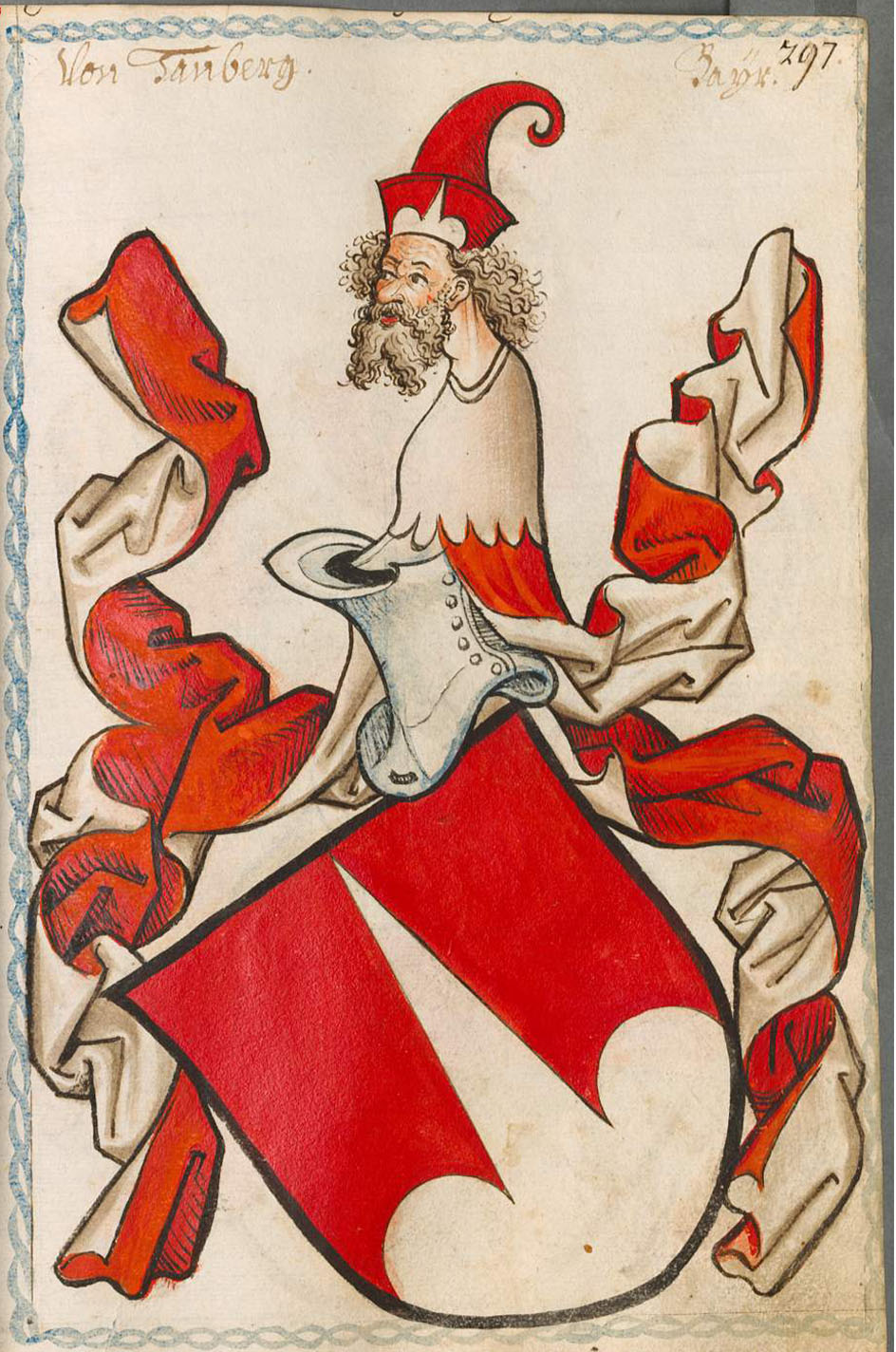 Scheibler'sches Wappenbuch , älterer Teil; Seite 297 Von Tanberg Bayern